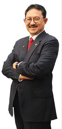 Iwan Wiranataatmadja, Diplomat dan Politisi Indonesia